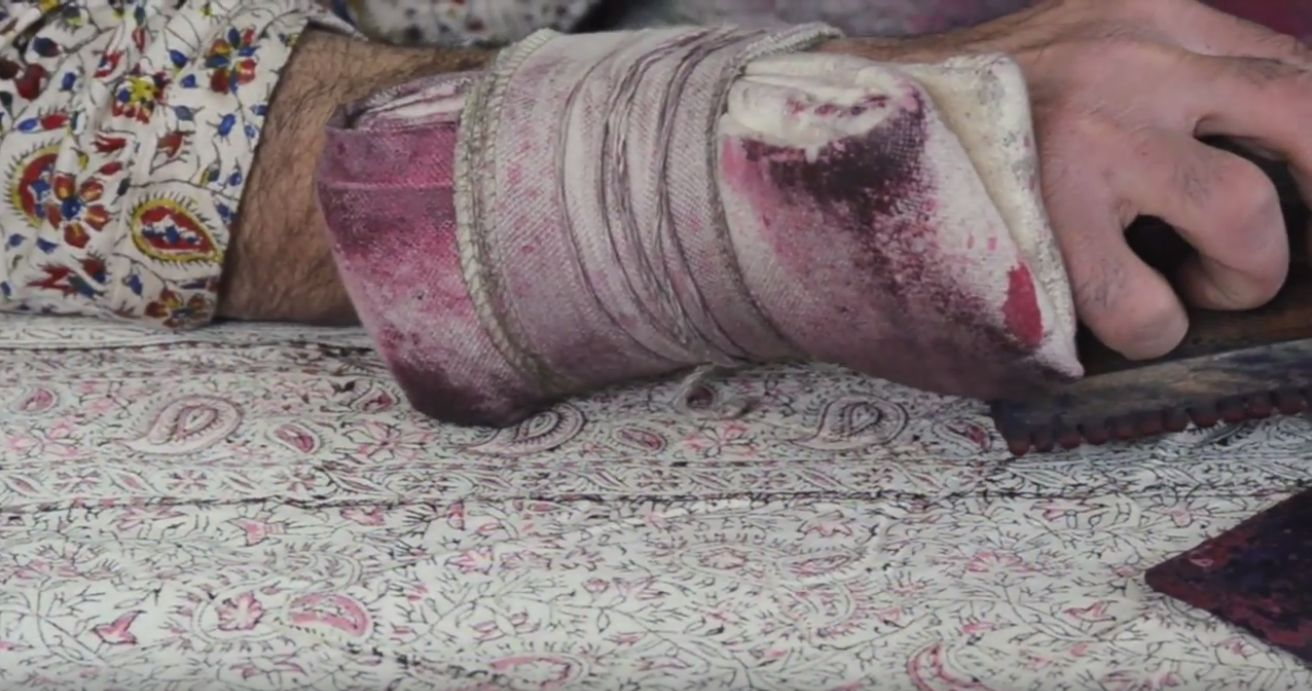 Една от метафорите за каламар е “изкуството на хилядите почуквания“, защото всяко нанасяне на печат е придружено от неколкократно потупване върху клишето, докато боята проникне прецизно в плата. Този процес може да бъде травмиращ за занаятчията, който предпазва ръката си с възглавничка от плат.